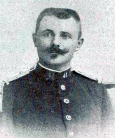 Achille Paroche en 1898.